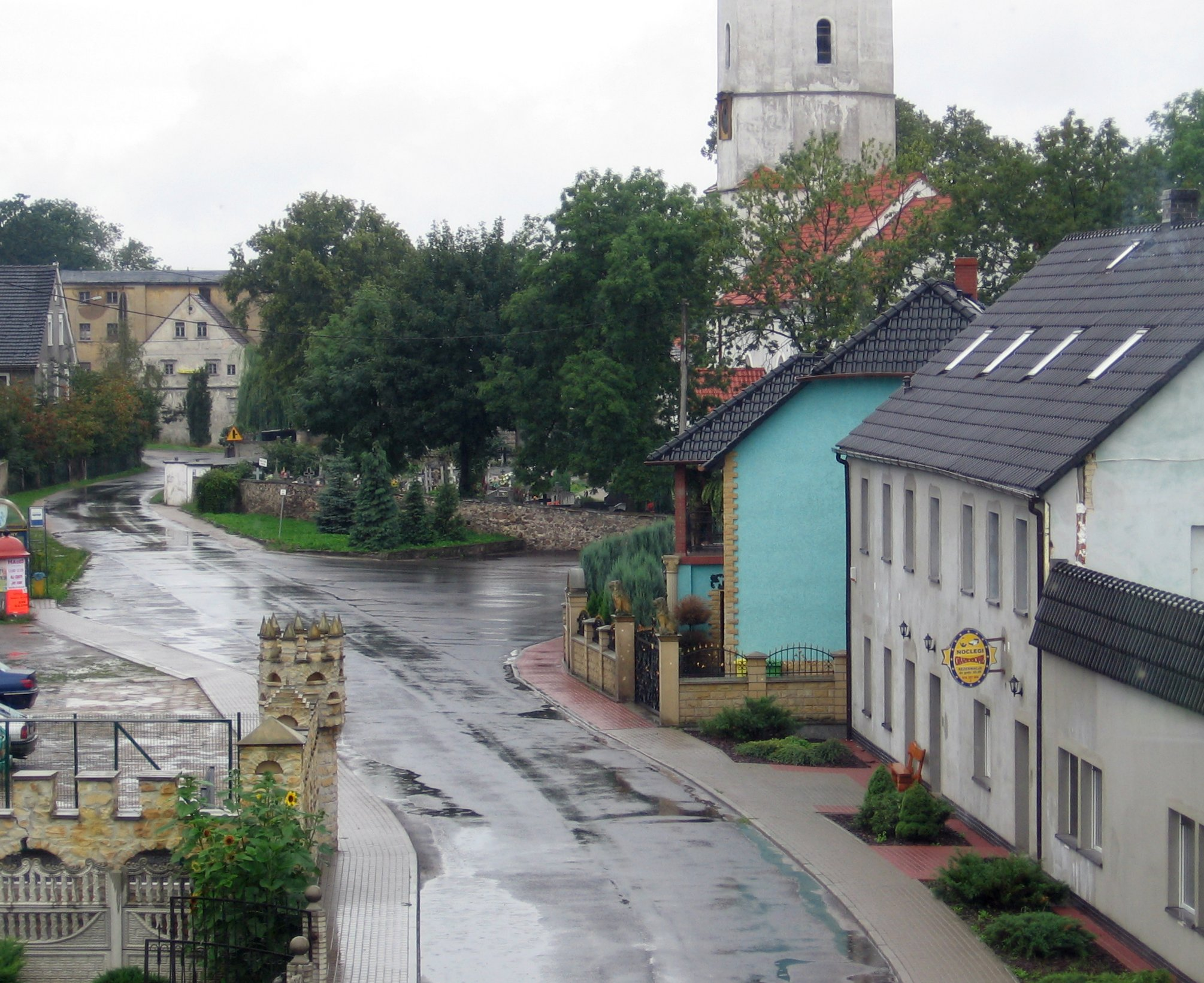 Kraśnik Dolny, Poland